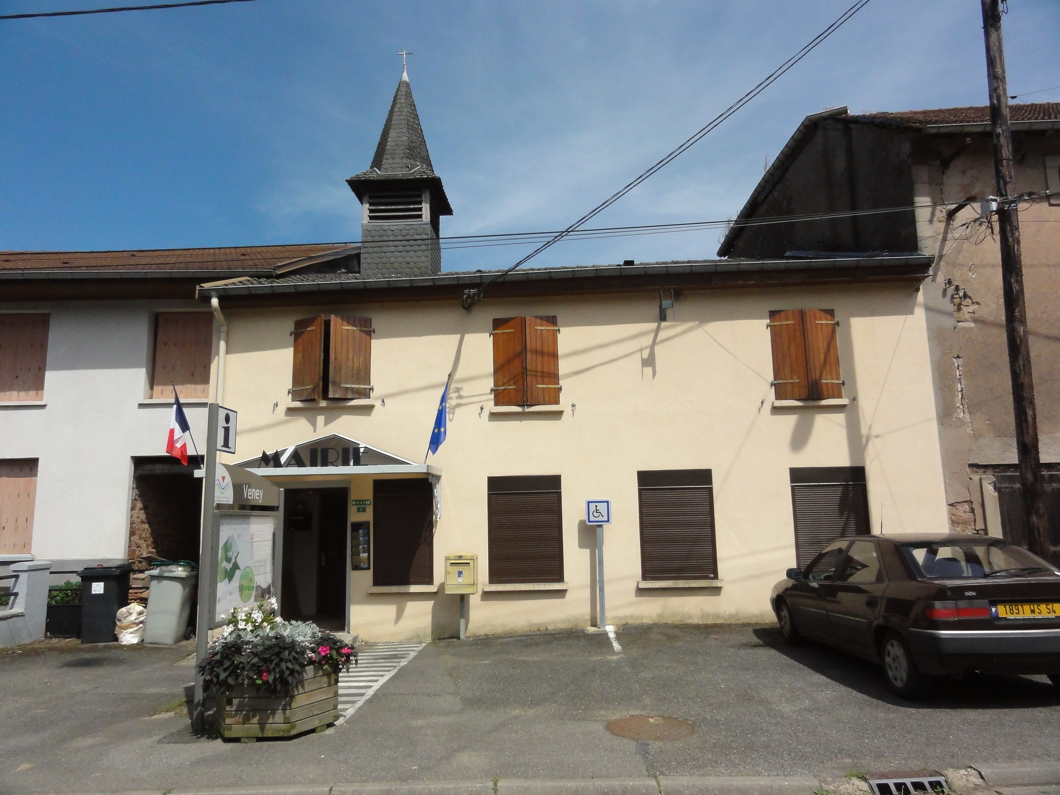 Veney (M-et-M) mairie